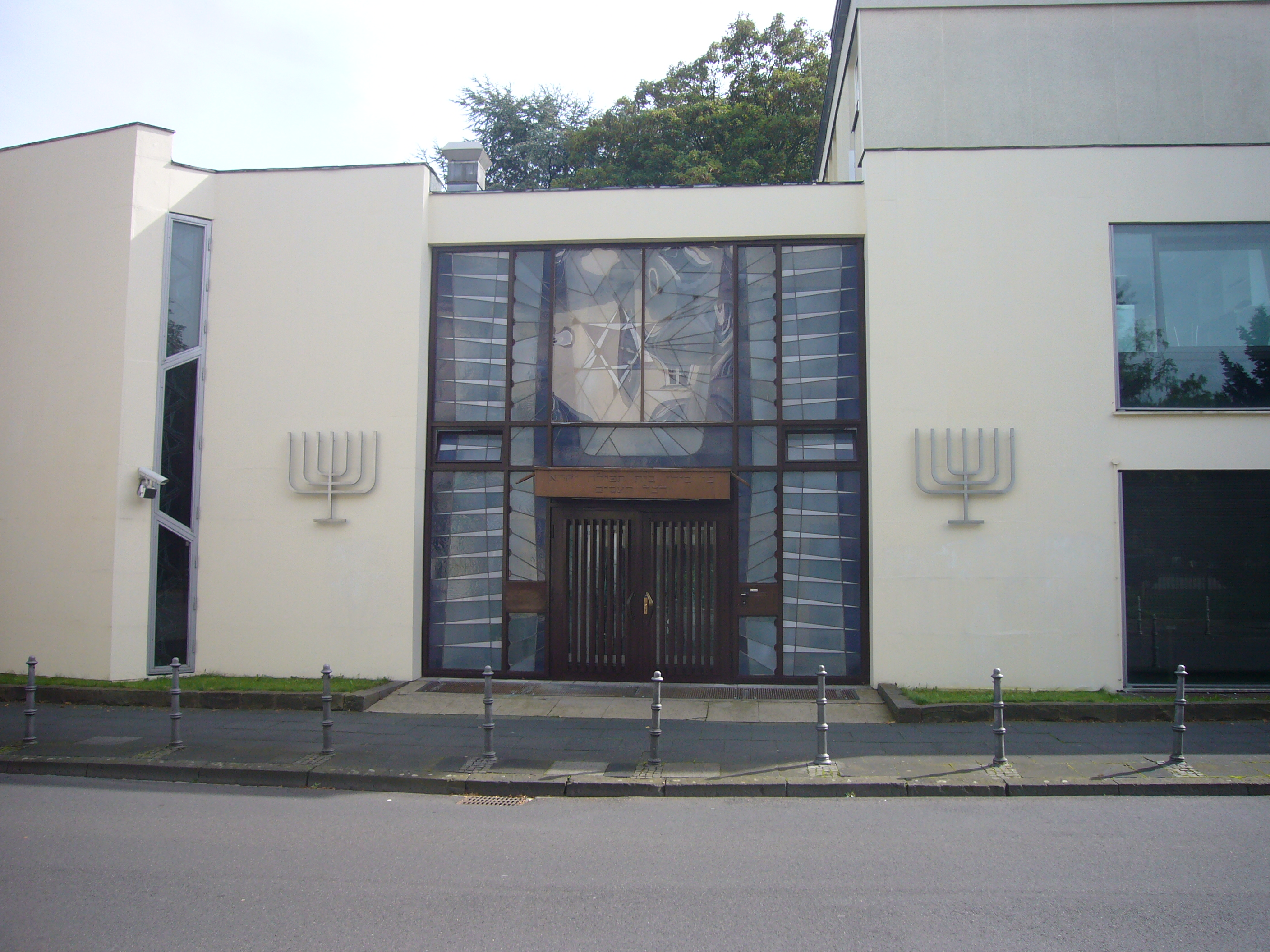 Gebäude in der Tempelstraße 2-4 in Bonn (Synagoge), Ortsteil Gronau